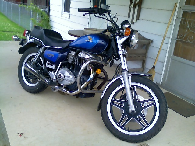 1982 Honda CM450A Hondamatic